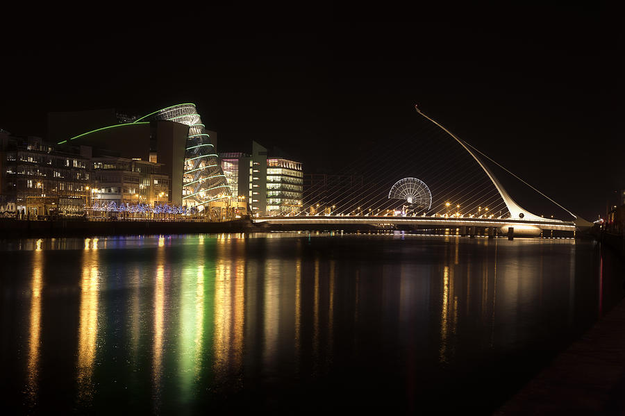 Río Liffey a su paso por Dublín, docklands y Beckett bridge por la noche.